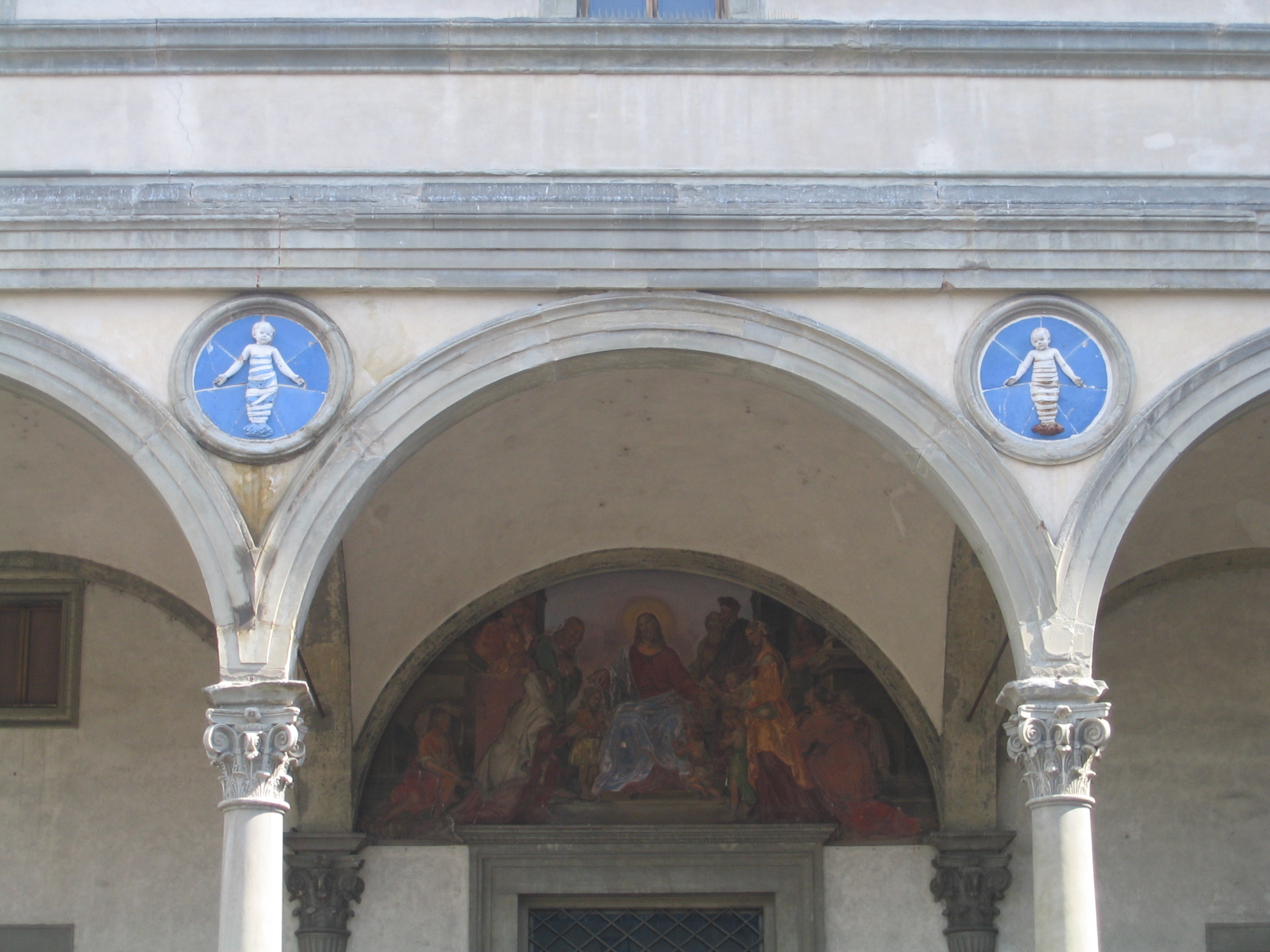 Particolare dell'Ospedale degli Innocenti, realizzato da Brunelleschi